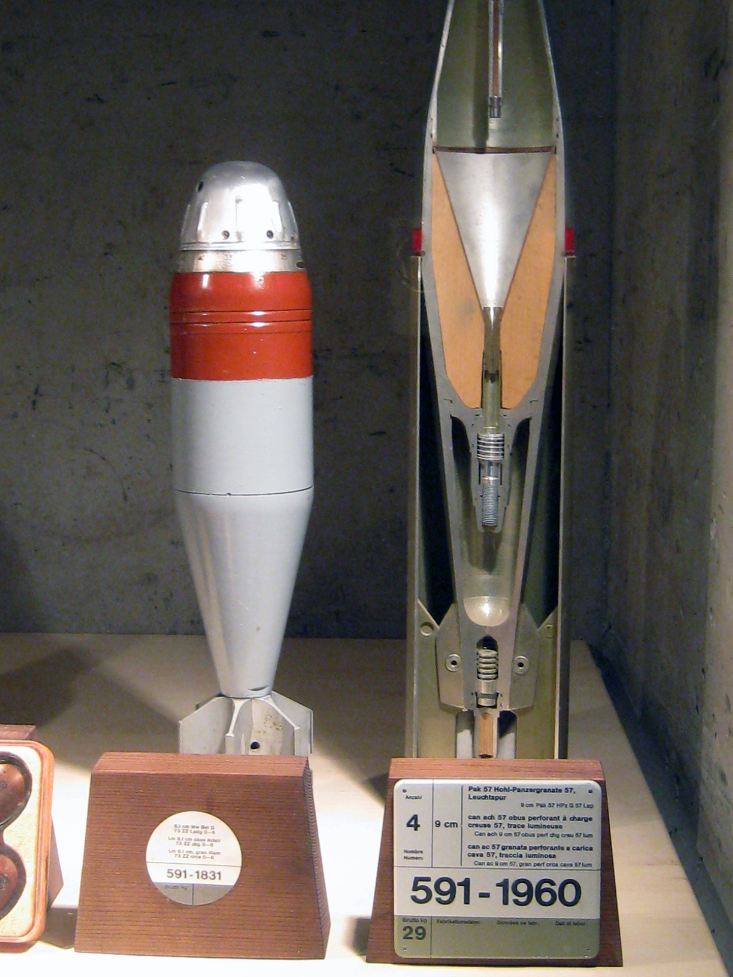 Festungsmuseum Crestawald, Beleuchtungsgeschoss für Minenwerfer 8,1 cm und Hohl-Panzergranate für Pak 57